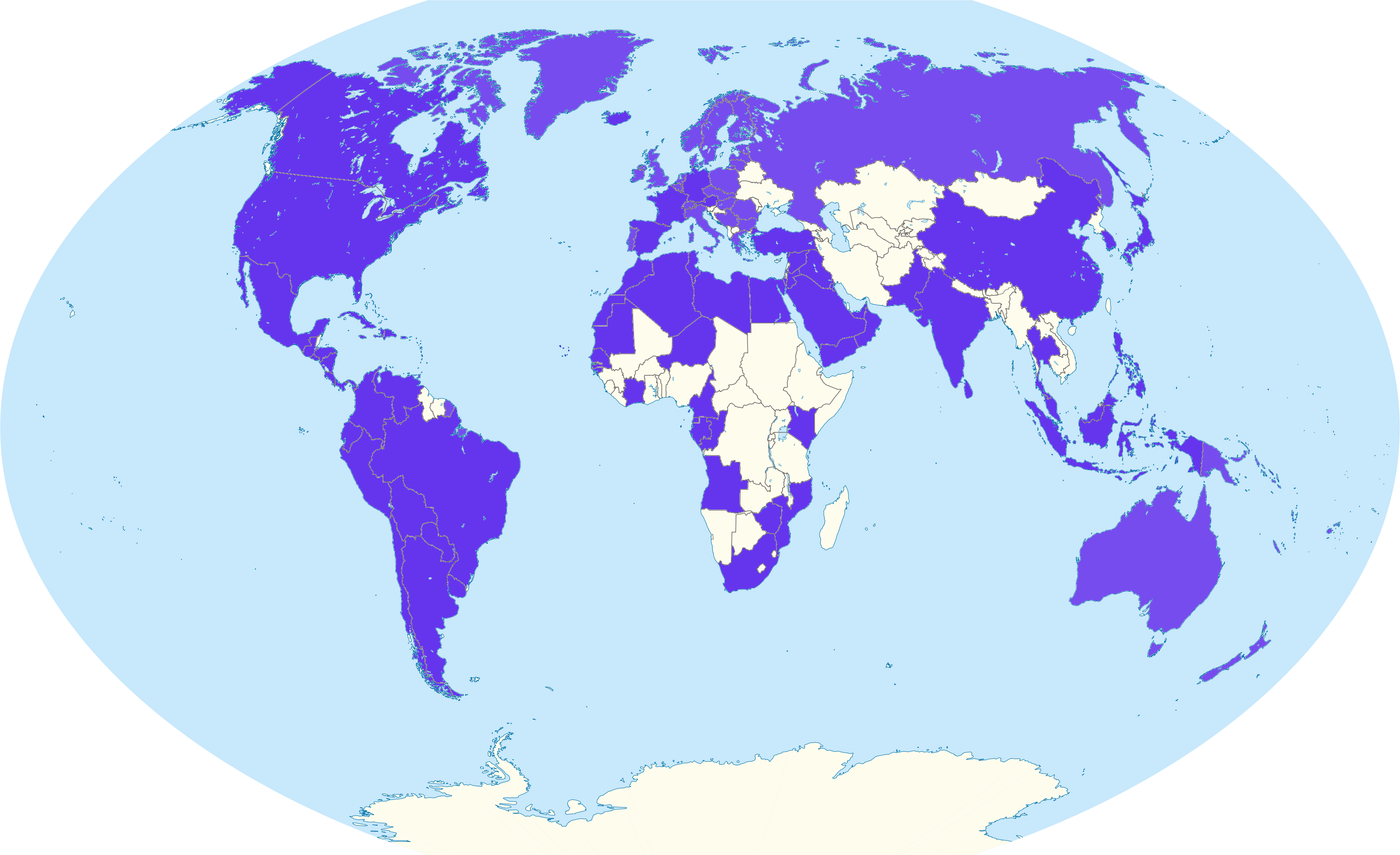 Países con pabellón en la Expo 92. Plantilla de mapa de